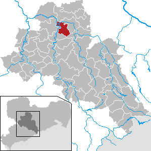 Ziegra-Knobelsdorf in Saxony - district Mittelsachsen